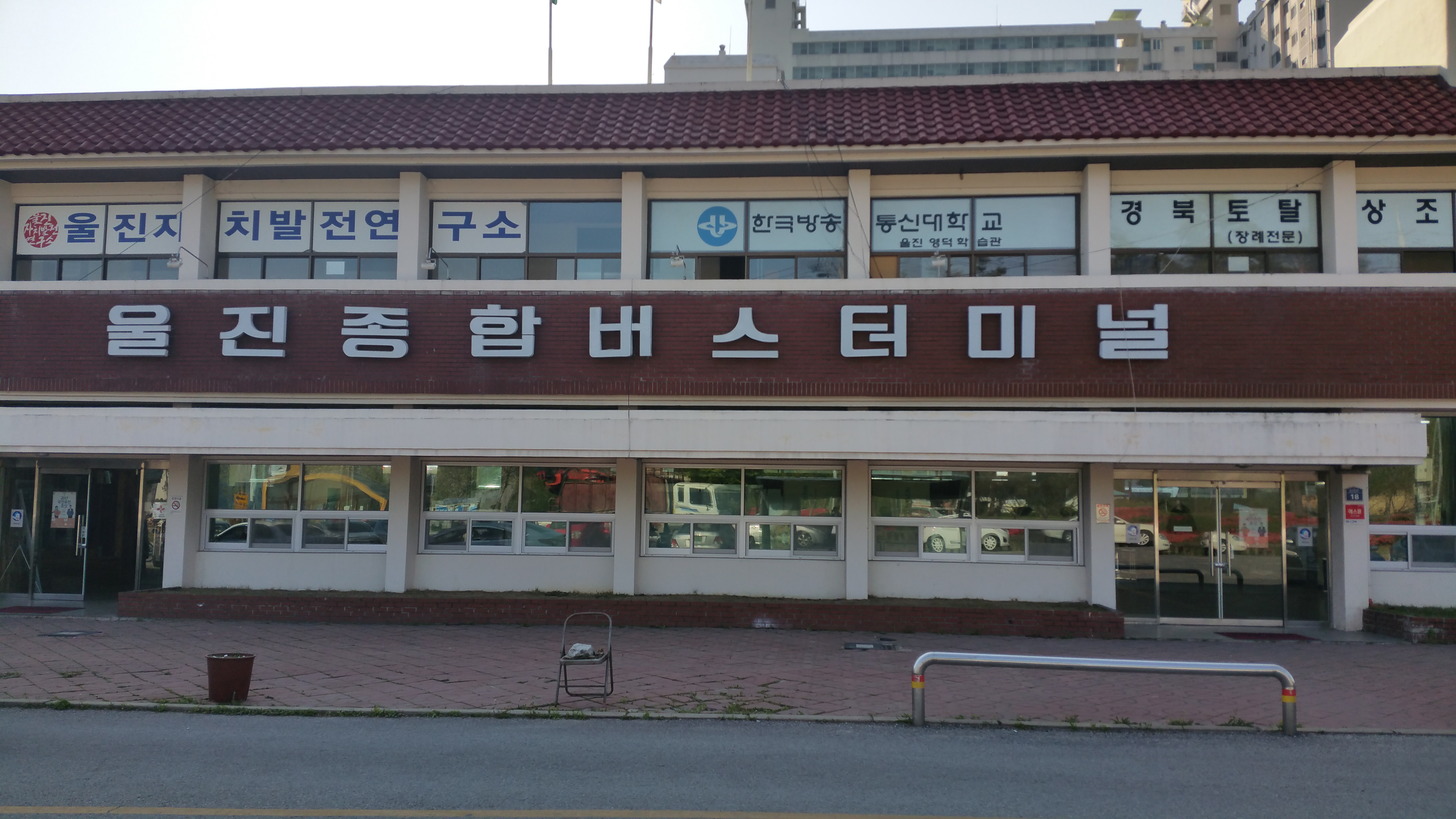 2017년 4월 29일에 촬영된 울진종합버스터미널